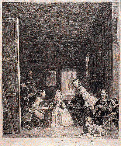 Las Meninas. Goya's engraving after Velazquez